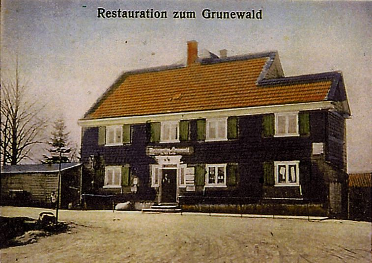 Gasthaus am Grunewald in Dabringhausen